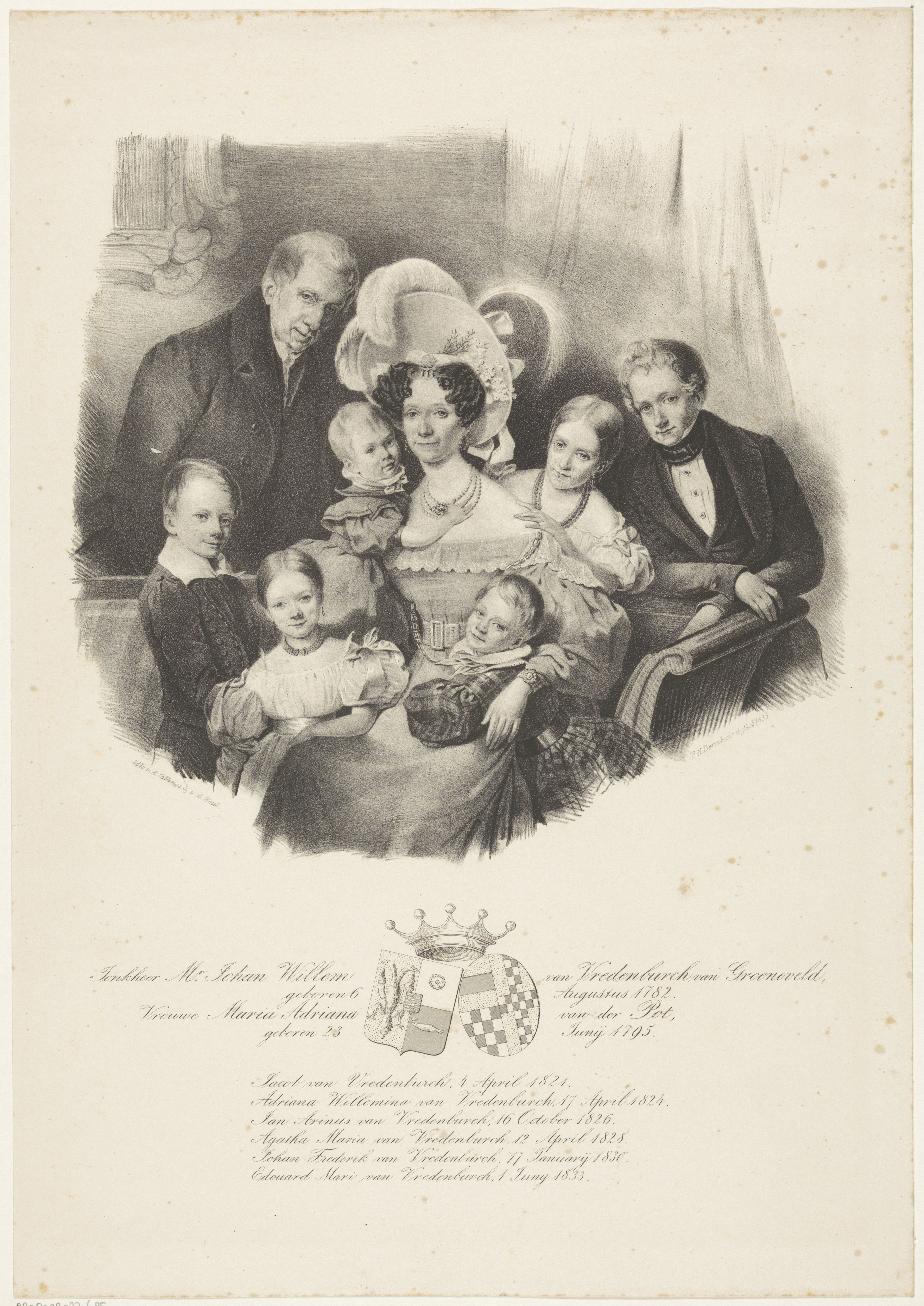 IdentificatieTitel(s): Het gezin va Johan Willem van Vredenburch van Groeneveld en zijn vrouw Maria Adriana van der PotVerzameling der familie portraiten van het geslacht Van Vredenburch (serietitel)Objecttype: prent Objectnummer: RP-P-OB-27.685Opschriften / Merken: verzamelaarsmerk, verso, gestempeld: Lugt 2228Omschrijving: De moeder zit op de bank met de kinderen om haar heen. De vader staat links van haar achter de bank. Onder het portret de namen en geboortedata van de geportretteerden. Daarbij de wapens van de twee families.VervaardigingVervaardiger: prentmaker: Pieter Gerardus Bernhard (vermeld op object)supervisie: jonkheer Johan Willem van Vredenburch van Groenevelddrukker: A. Collings & van den Hout (vermeld op object)Plaats vervaardiging: prentmaker: Den Haagdrukker: RotterdamDatering: 1835Fysieke kenmerken: lithografieMateriaal: papier Techniek: lithografie (techniek)Afmetingen: blad: h 470 mm × b 330 mmOnderwerpWat: family lifehistorical personsarmorial bearing, heraldryWie: jonkheer Johan Willem van Vredenburch van Groeneveldjonkvrouw Maria Adriana van Vredenburch-Van der PotVerwerving en rechtenVerwerving: onbekend 2006Copyright: Publiek domein